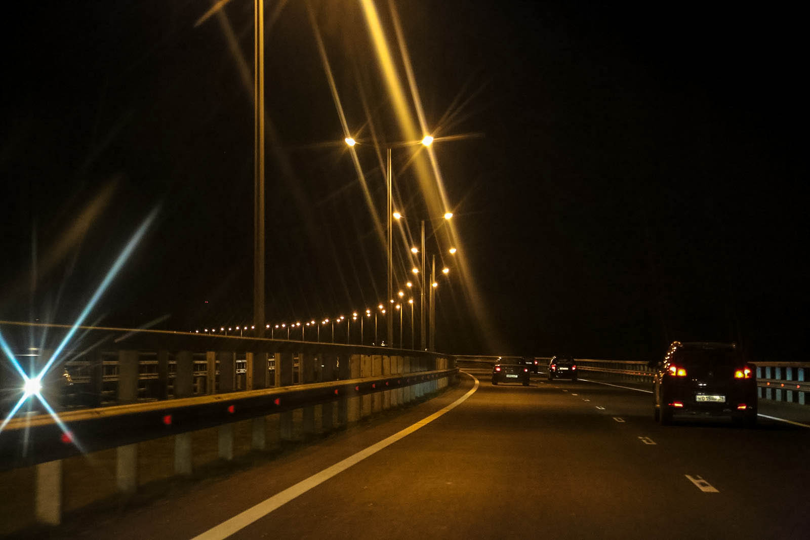 Приморское кольцо — строящаяся автомагистраль в Калининградской области, первая в регионе автодорога такого класса. Приморское кольцо свяжет между собой Калининград, приморские курорты Светлогорск, Пионерский, Зеленоградск, международный аэропорт Храброво и города Балтийск и Светлый. Первый участок трассы Калининград-Зеленоградск и ответвление к аэропорту Храброво введён в эксплуатацию в 2009 году.